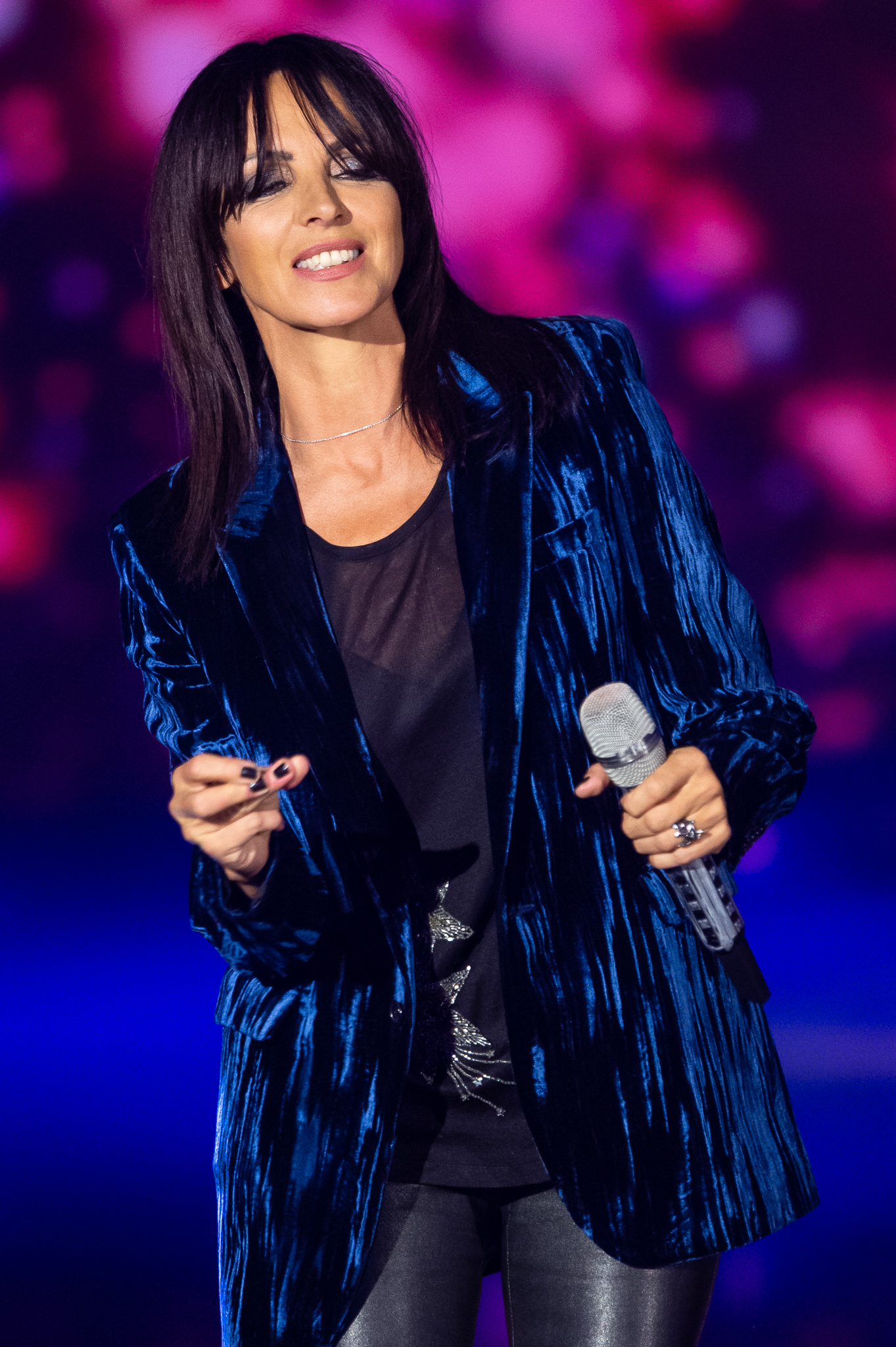 BR,Bayerisches Fernsehen,Frankenhalle,Live-Sendung,Nena,Sternstunden-Gala,Sternstundengala